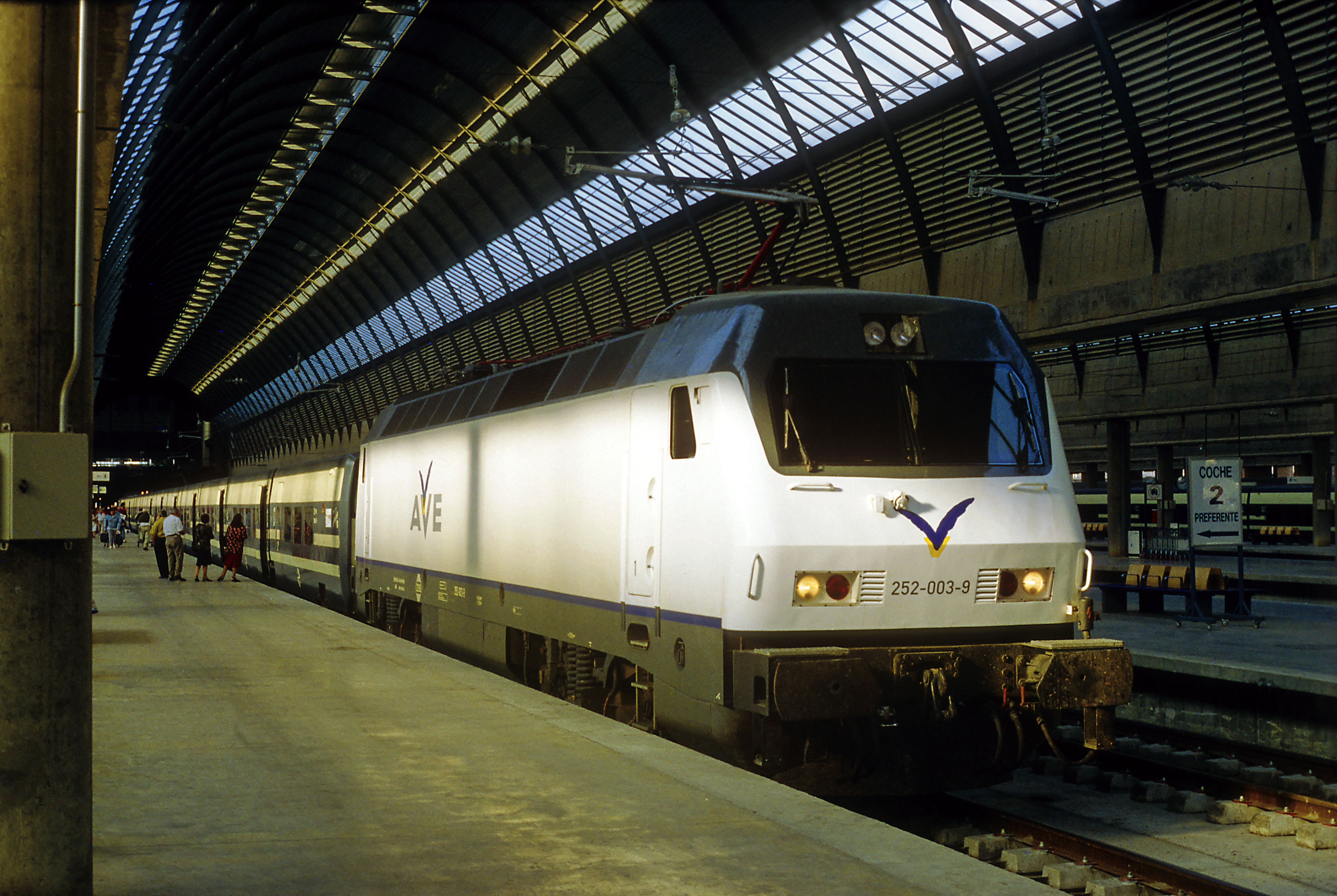 Talgo Pendular (Talgo 6) von Sevilla S.J. nach Barcelona Sants über die Schnellfahrstrecke Madrid–Sevilla.